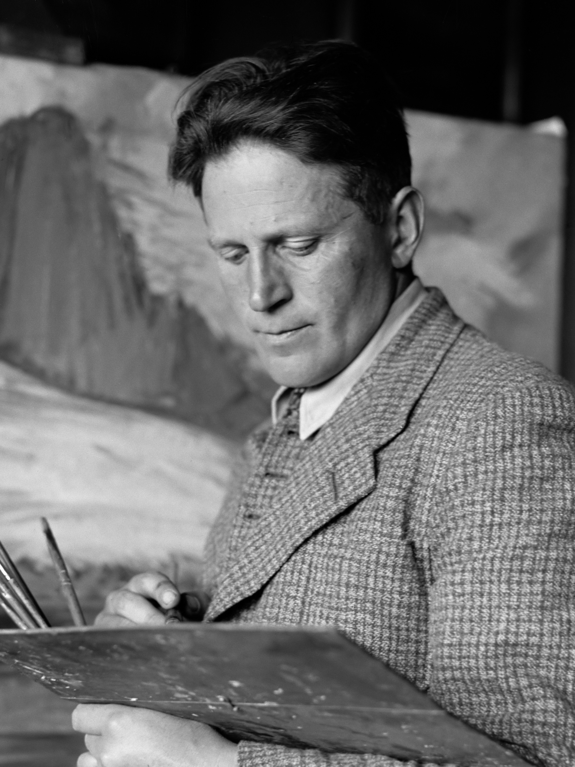 IJsland. Guðmundur Einarsson (1895-1963), beeldend kunstenaar uit Miðdal, in diens atelier aan het werk 1934